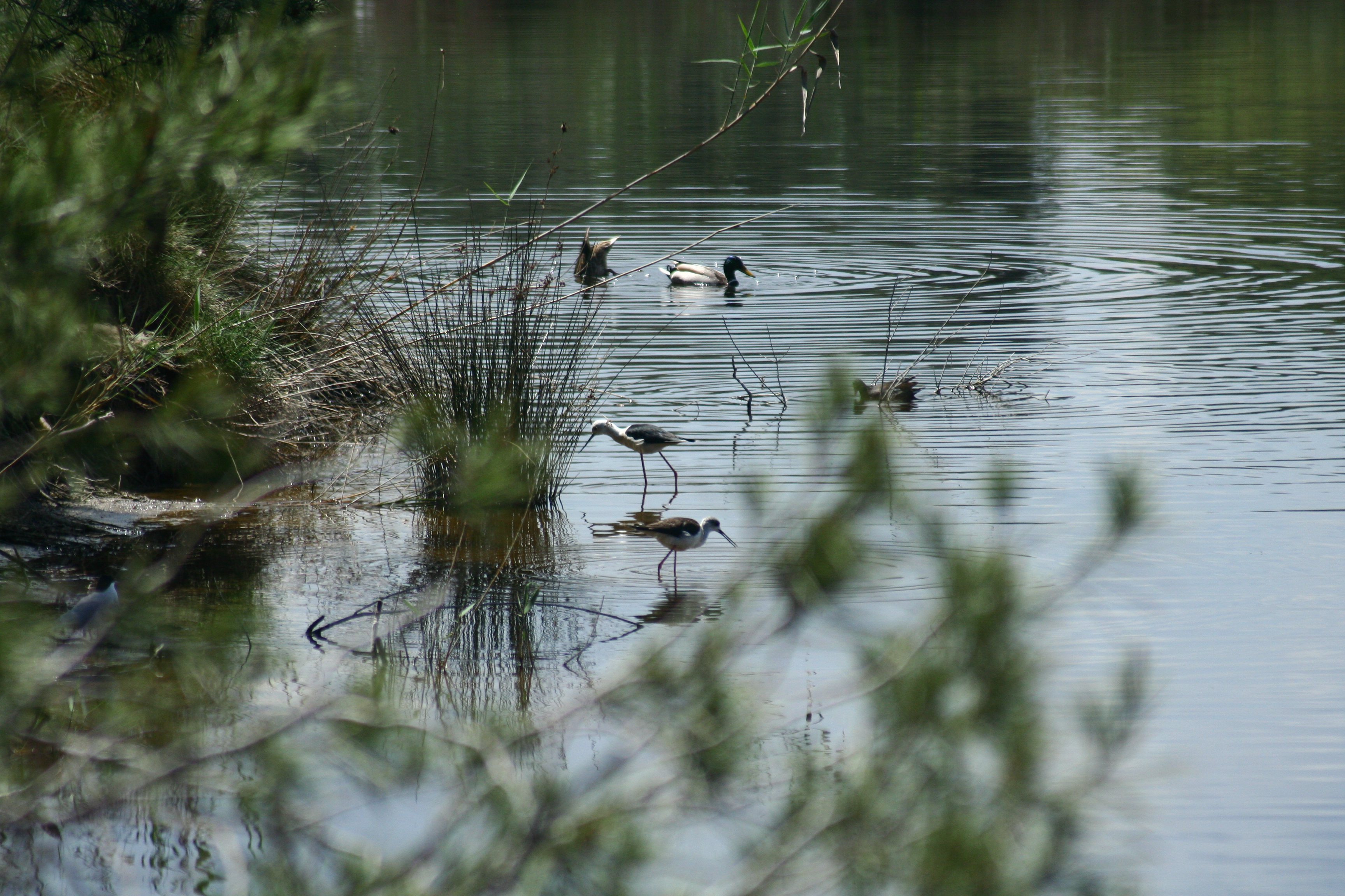 Cigüeñuelas (Himantopus himantopus) y ánades reales (Anas platyrhynchos) en la reserva de Racó de l'Olla (Valencia).